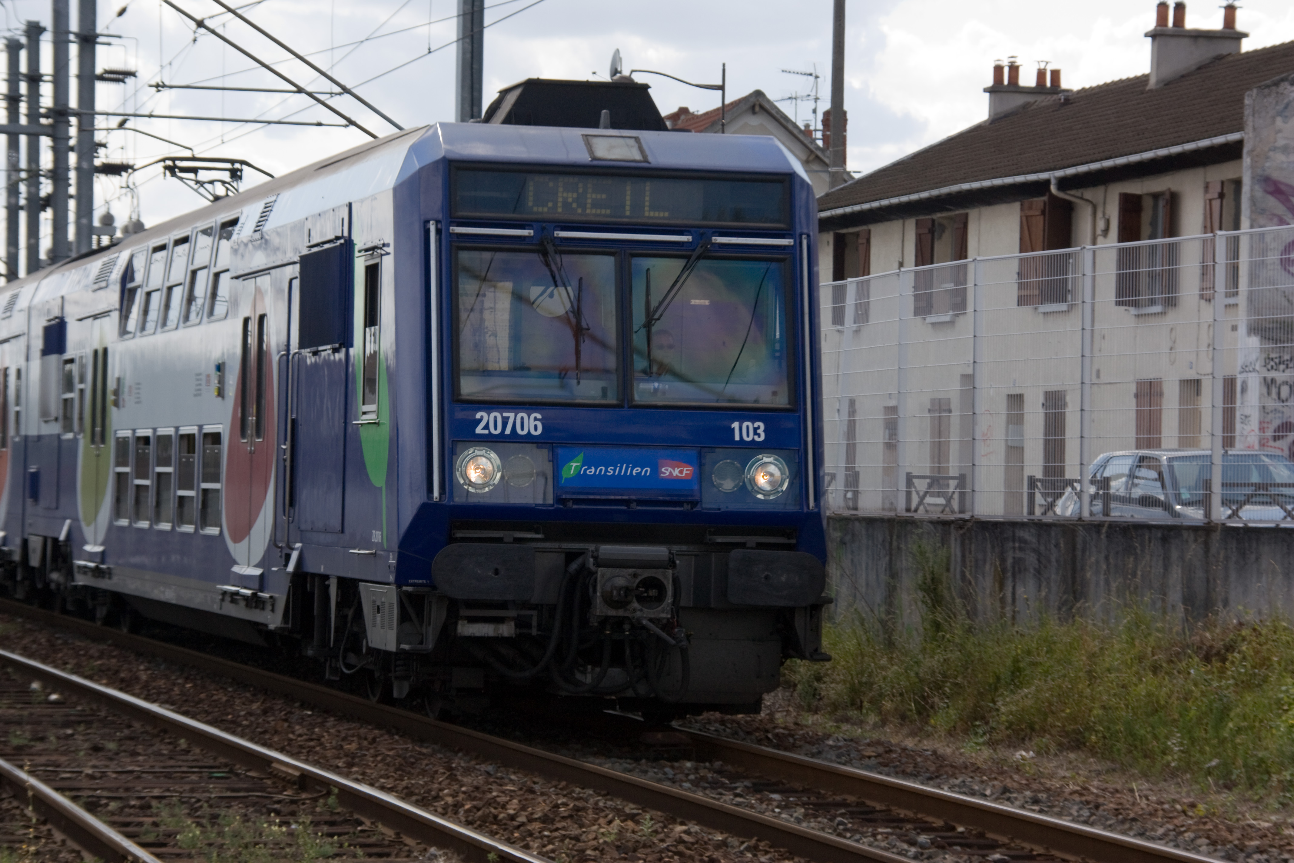 La Gare de Villiers-le-Bel - Gonesse - Arnouville, département du Val-d'Oise, France